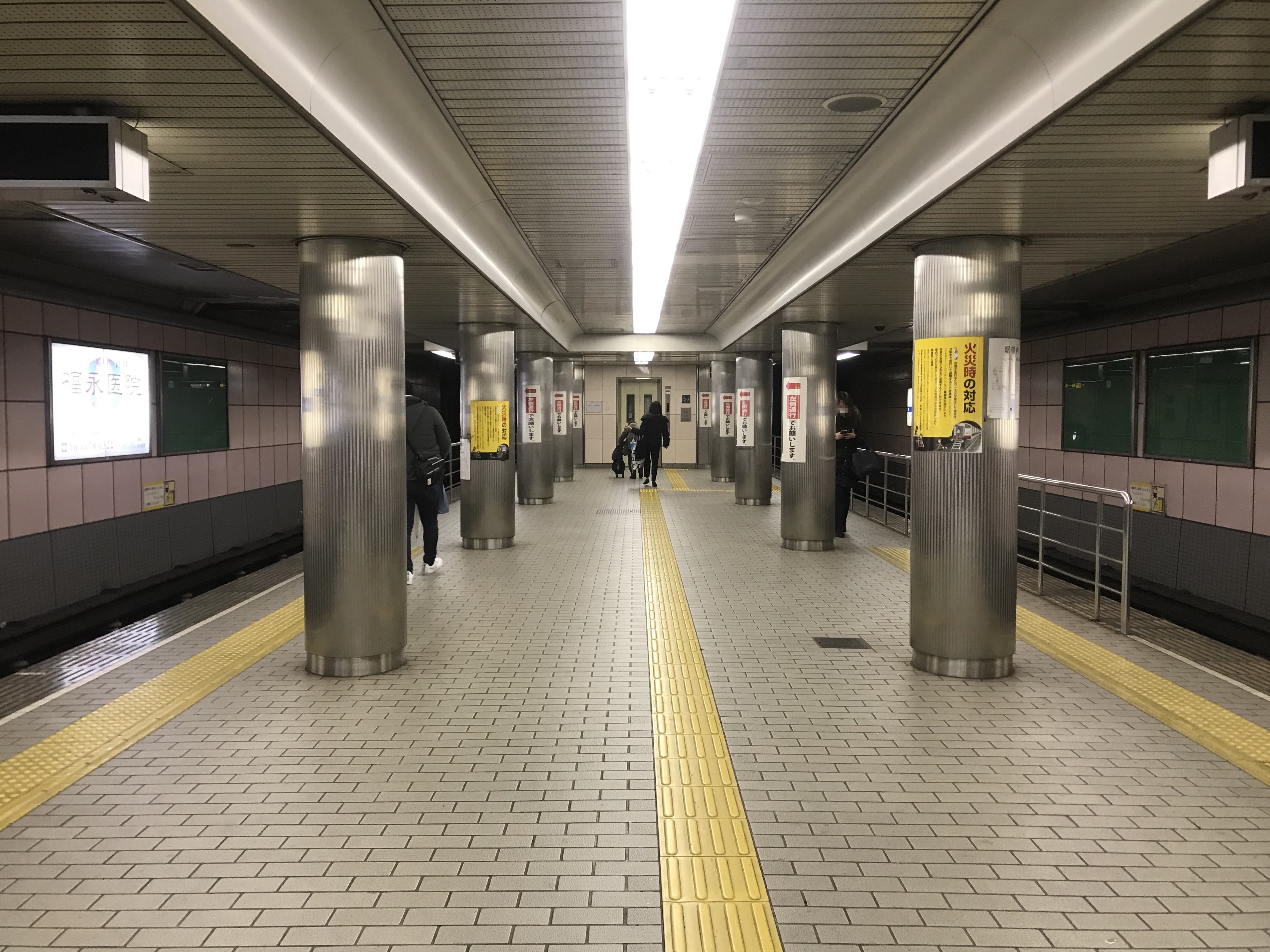 玉出駅のホーム(奥は北加賀屋方面)